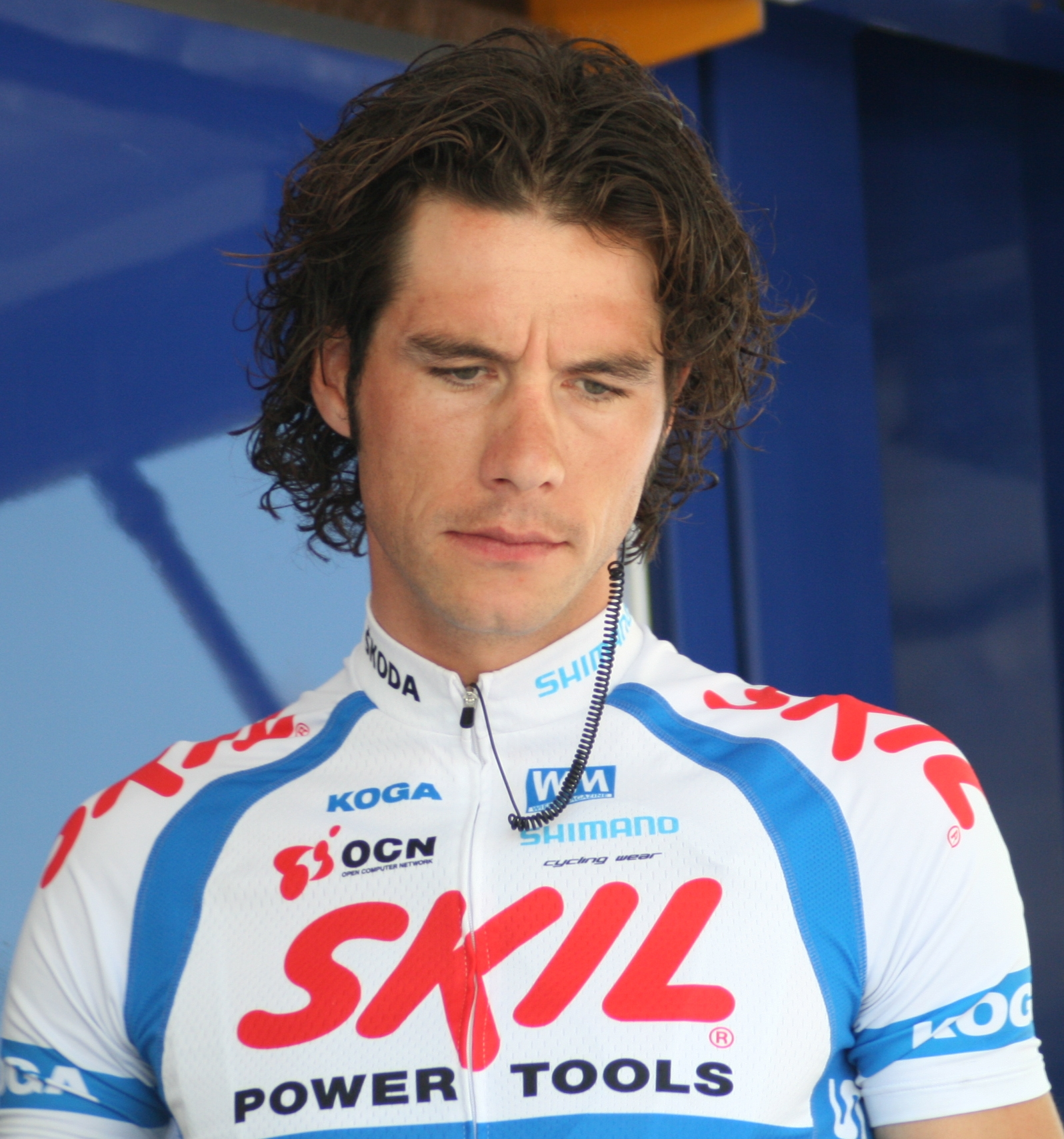 Roy Curvers, aux Quatre jours de Dunkerque 2008